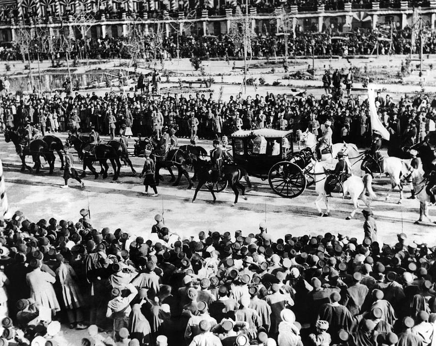 Parade militaire à l'occasion du couronnement de Reza Chah, le 25 avril 1926